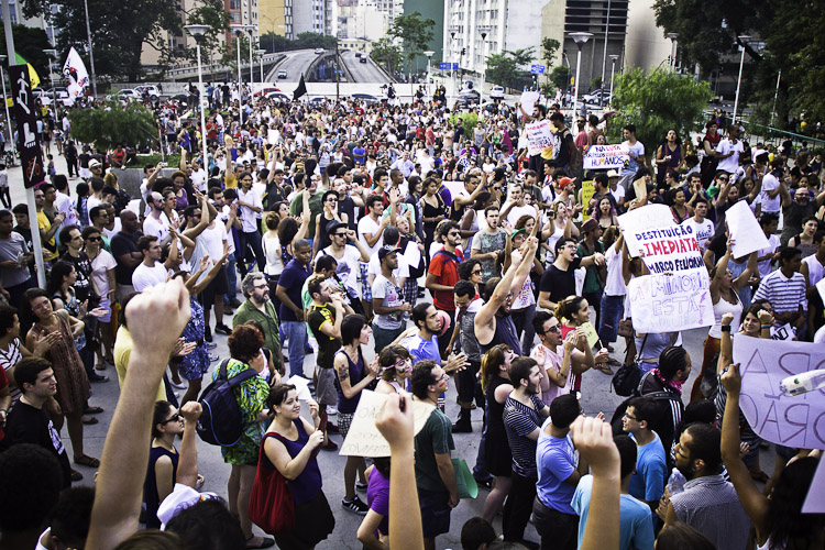 Ato de repúdio a nomeação de Marco Feliciano pra Comissão de Direitos Humanos • São Paulo/SP • 09/03/13 • (CC BY-SA) Fora do Eixo